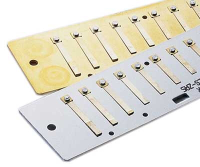 Hohner Messing Stimmplatten 0,9mm bzw.1,05mm stark